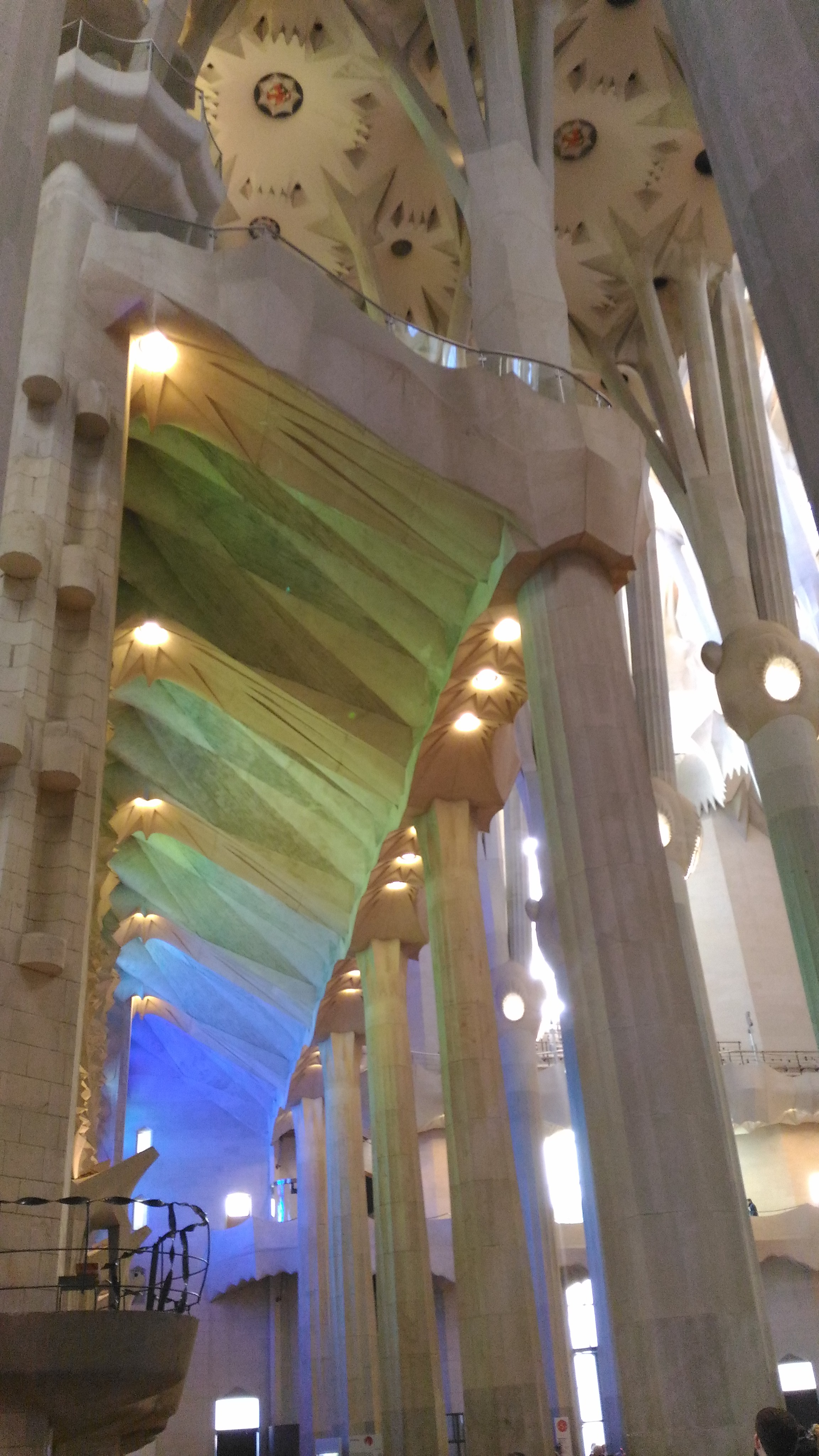 sagrada familia